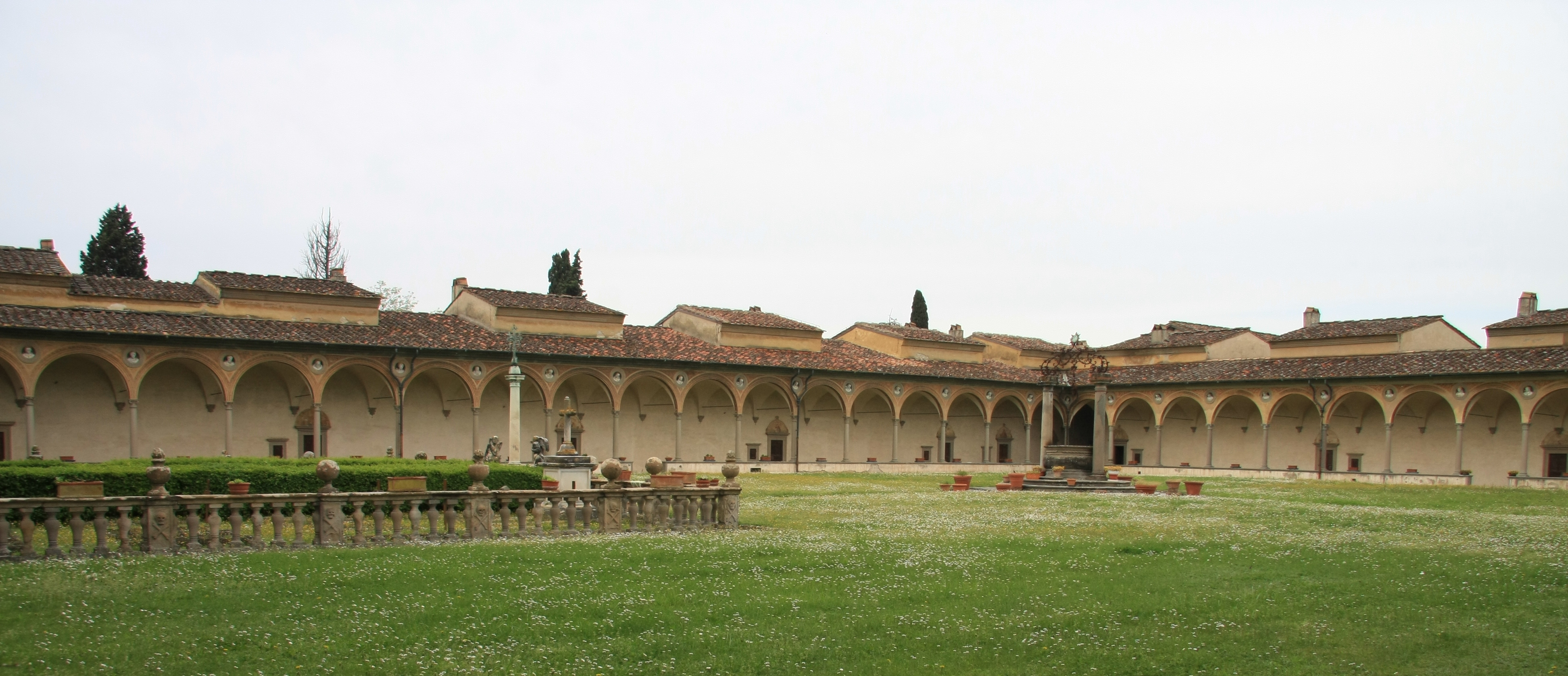 Big Cloister of Certosa del Galluzzo